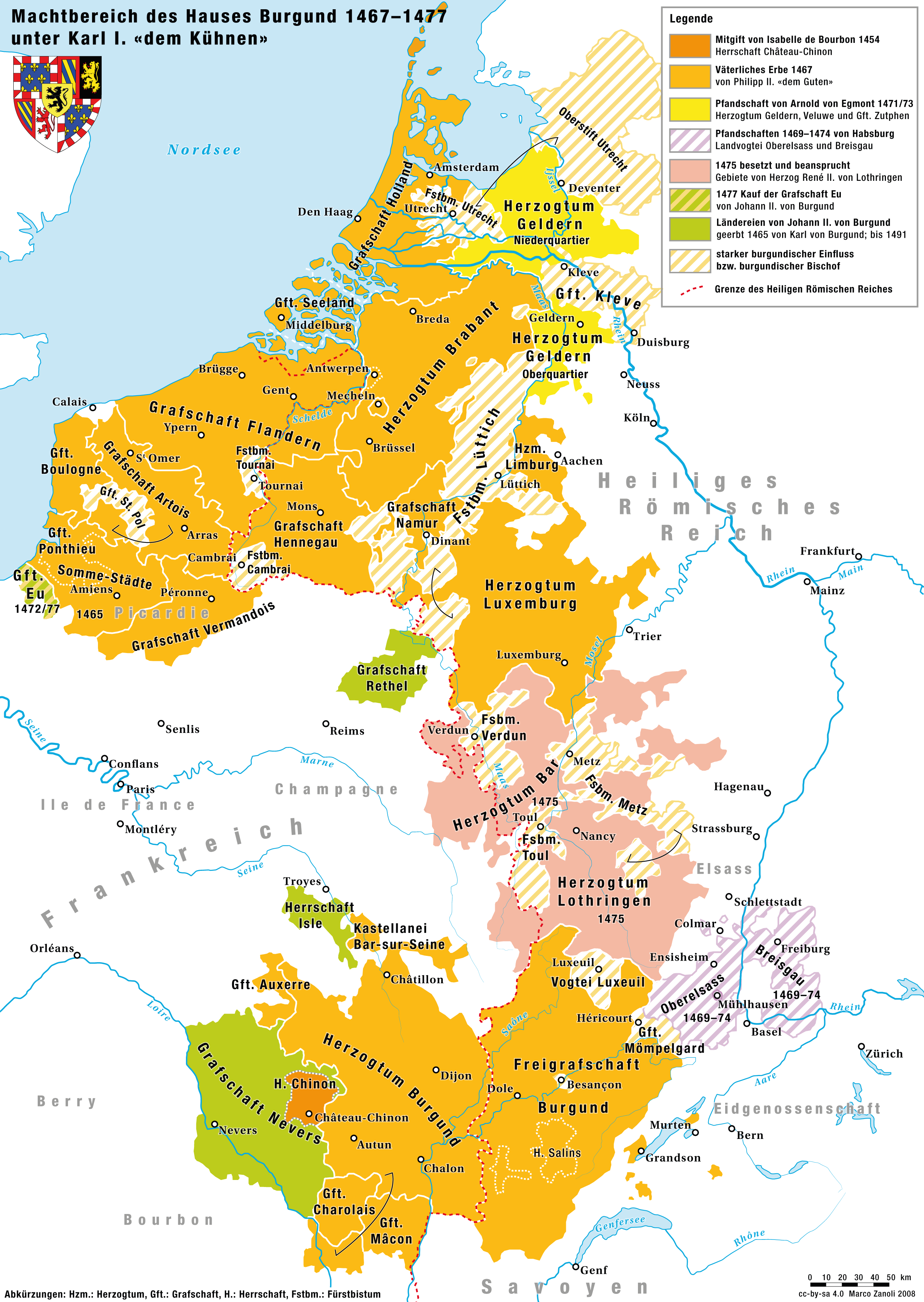 Das Herrschaftsgebiet des Hauses Burgund unter Karl I., dem Kühnen 1465/67–1477